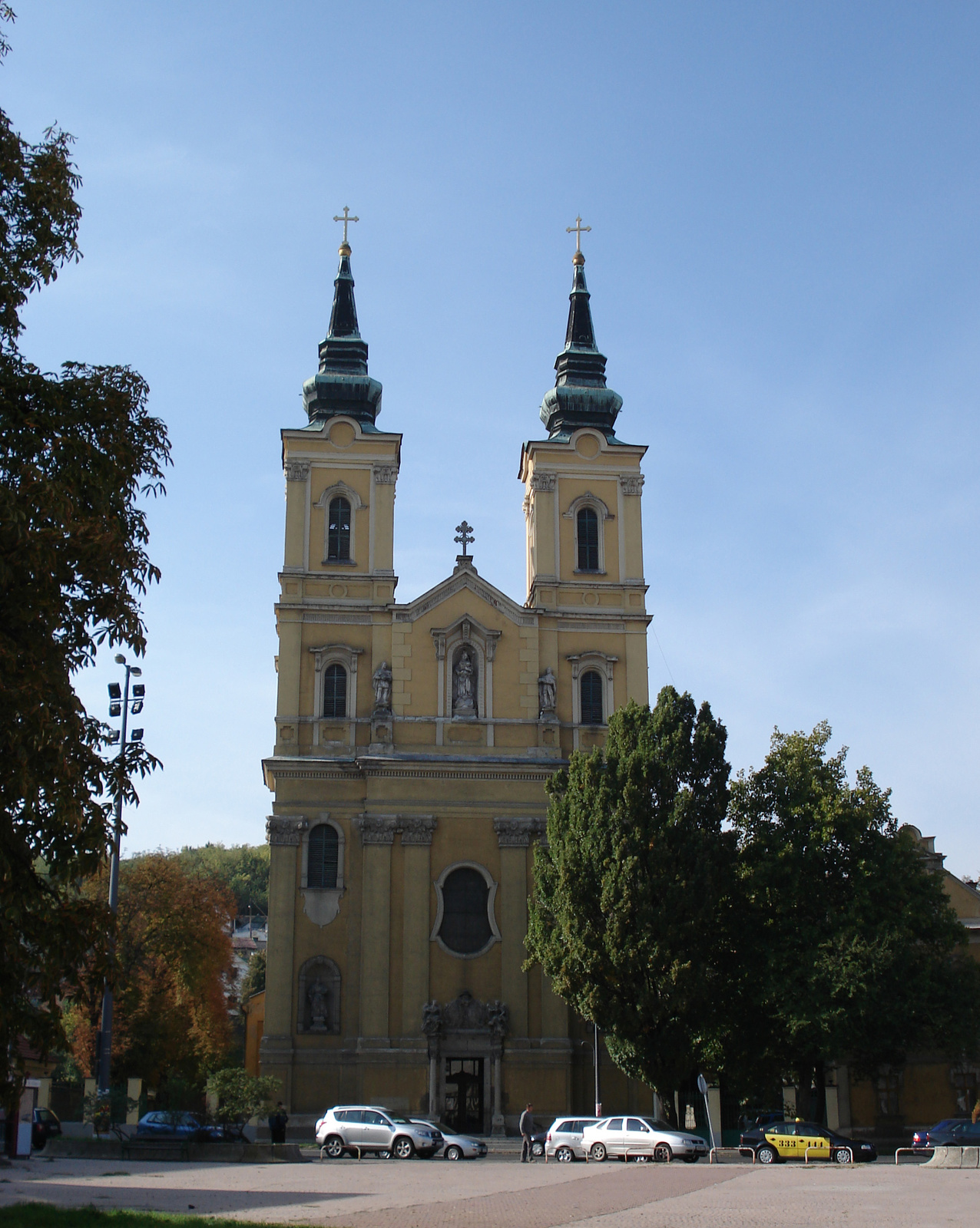 Alsóvárosi r.k. plébániatemplom (Mindszent) (Miskolc, Mindszent tér 2.) This is a photo of a monument in Hungary. Identifier: 2956